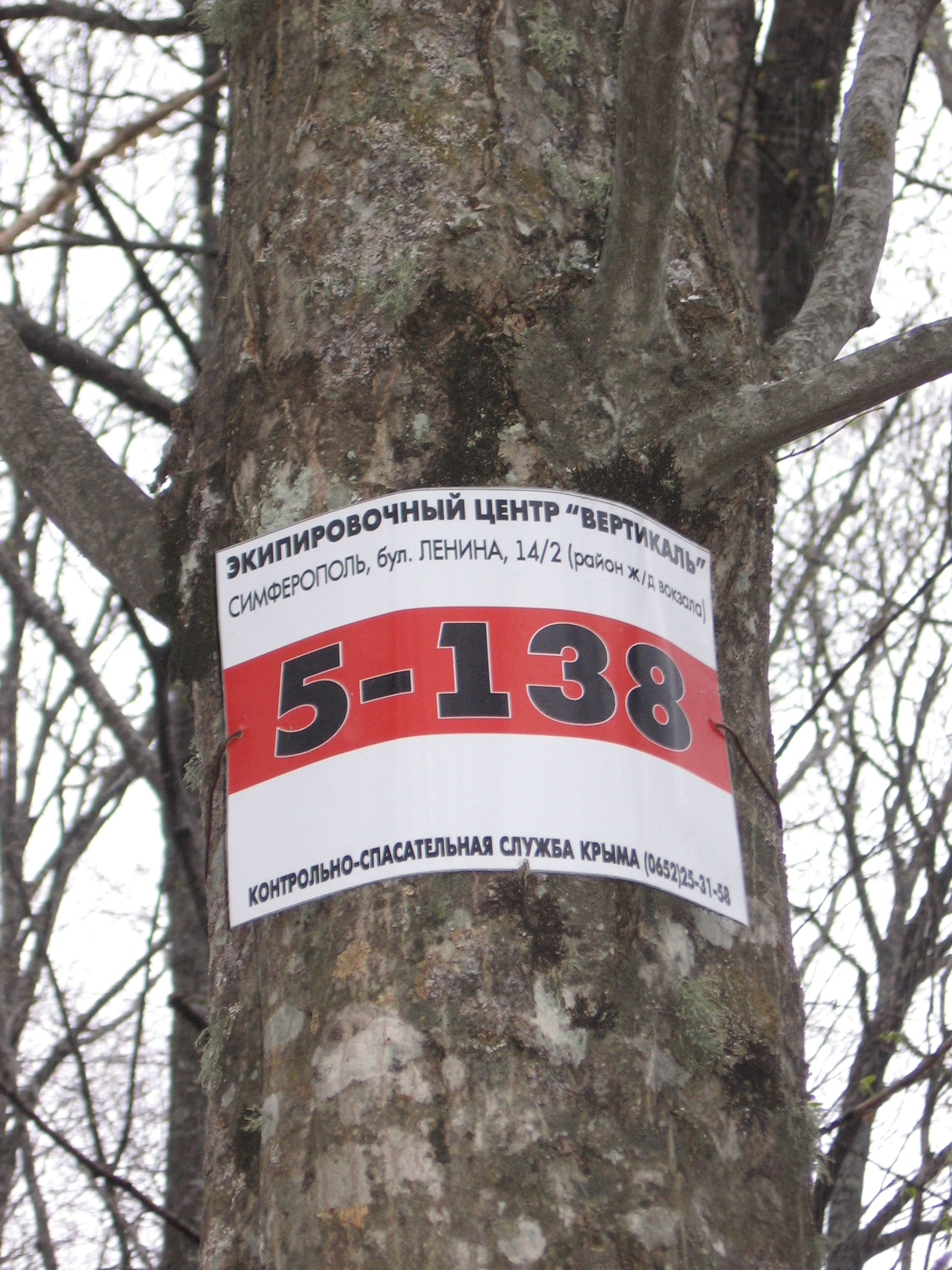 Елемент маркування турмаршруту в Криму